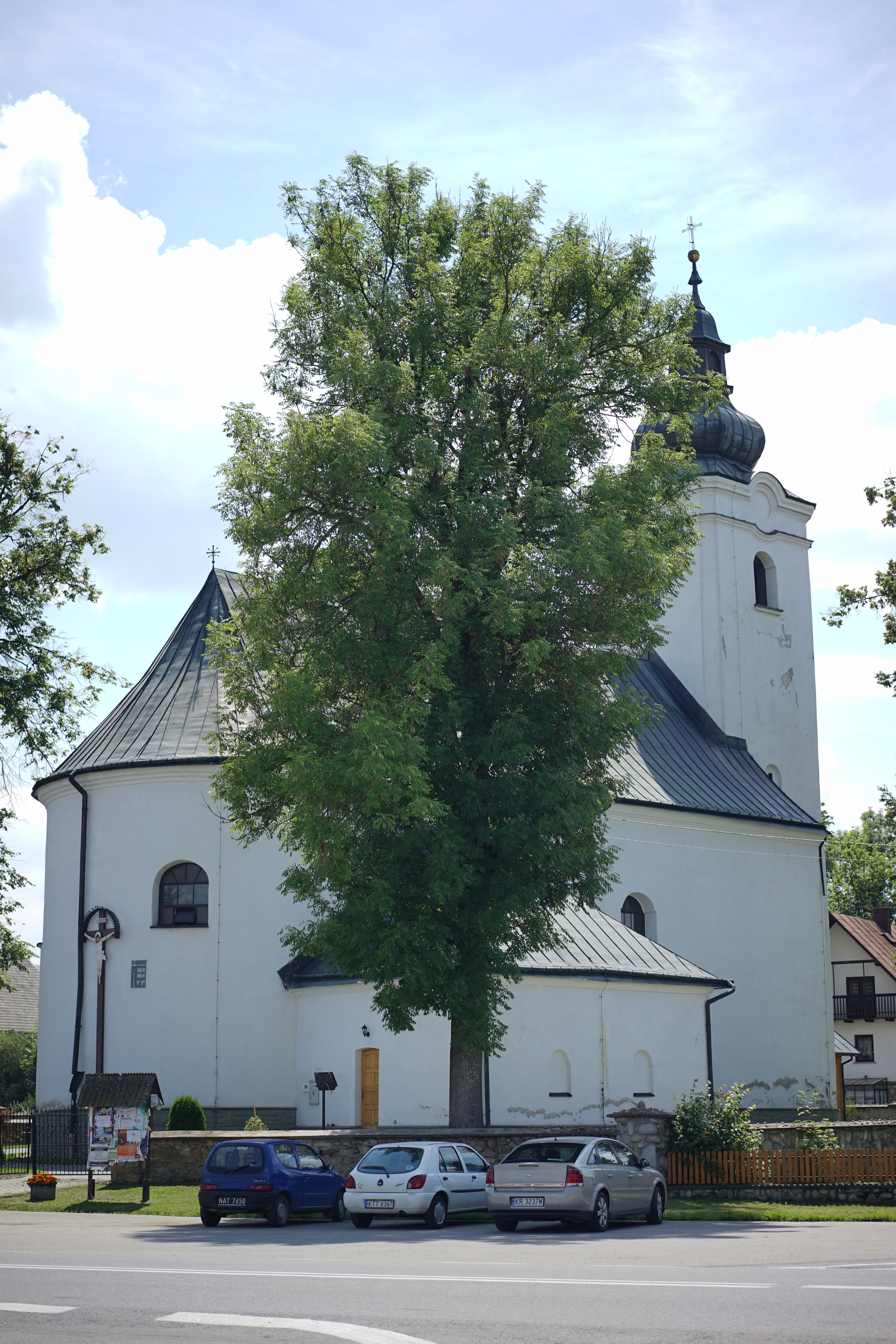 Nowa Biała, kościół par. p.w. św. Katarzyny Aleksandryjskiej, 1731-1748, ok. 1780